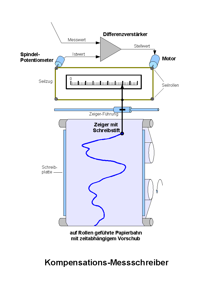 Messschreiber (Funktionsschema) Autor: Gisbert Glökler GisbertG